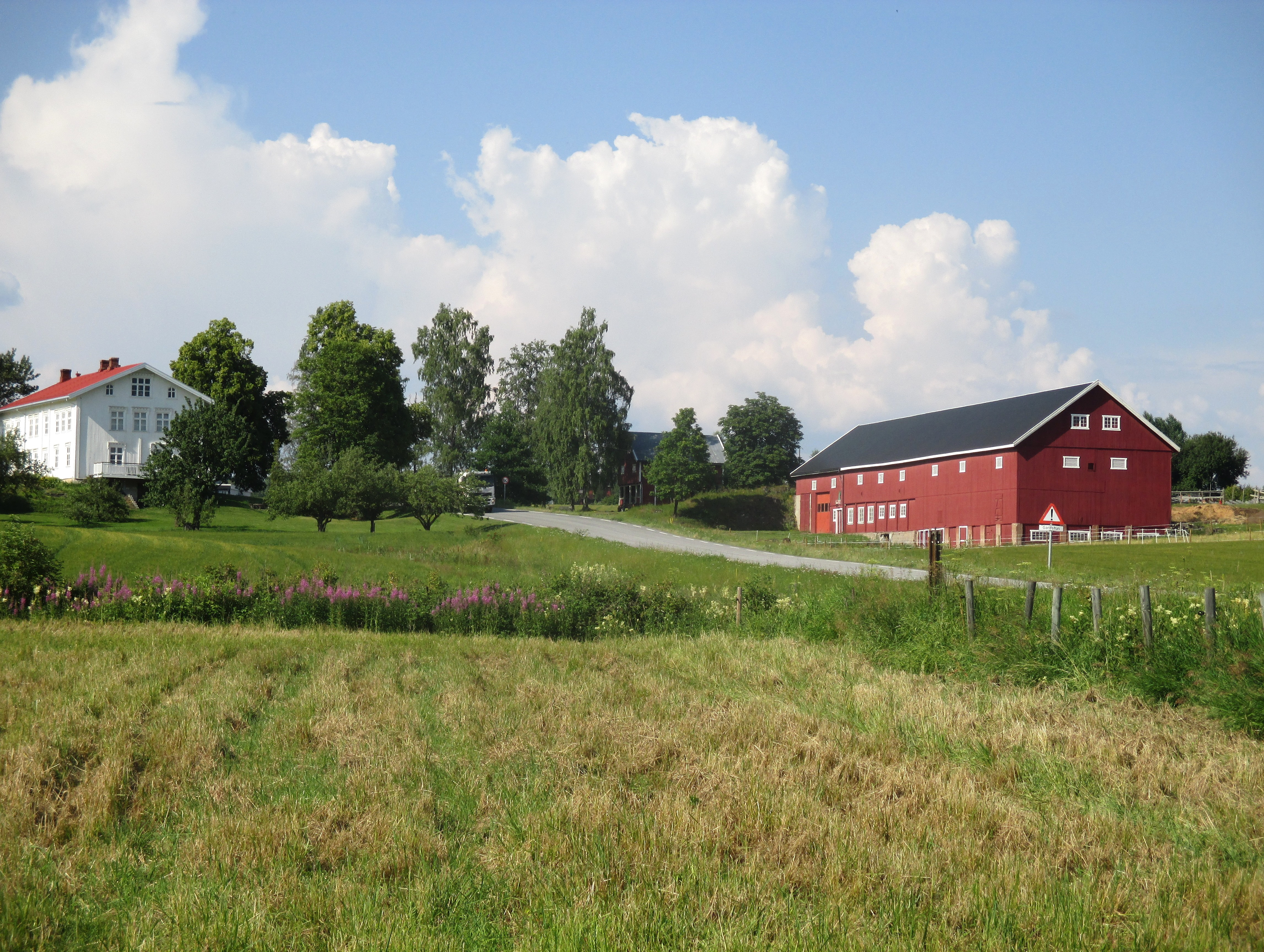 Fylkesvei 2340 (tidl. 74) ved Kraby